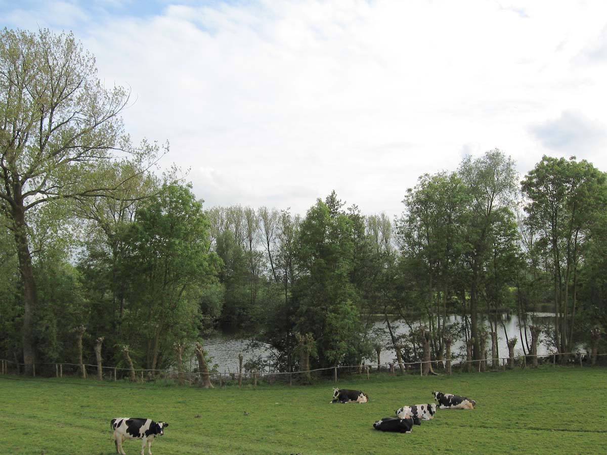 Eendenkooi "De Kuilen", gezien vanaf de dijk. Achthoven (Zederik)